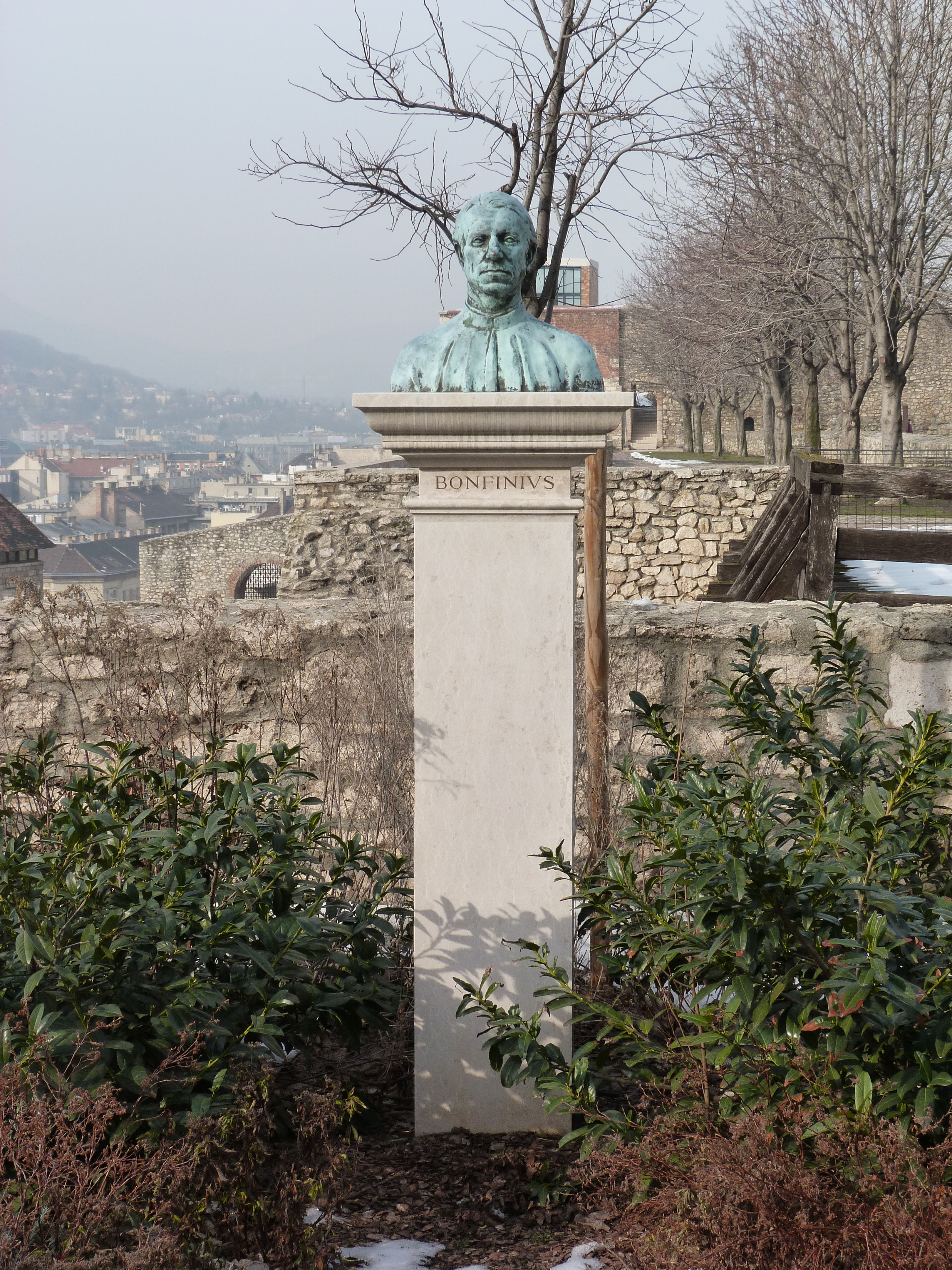 A felvétel 2013. január 25 -én, pénteken készült Budapesten, a Királyi Várban. Antonio Bonfini, Mátyás király krónikásának emlékszobra. ©© Published under Creative Commons in the Metapolisz DVD line. All of the photos and vids in the Metapolisz DVD line are under Creative Commons and can be used even for commercial – for profit – purposes. Recommended Citation Derzsi Elekes Andor: Metapolisz DVD line ©© Megjelent Creative Commons alatt a Metapolisz sorozatban. A Metapolisz sorozat valamennyi képe és filmje Creative Commons alatti valamint kereskedelmi - for profit - célra is felhasználható. Ajánlott hivatkozás: Derzsi Elekes Andor: Metapolisz DVD line